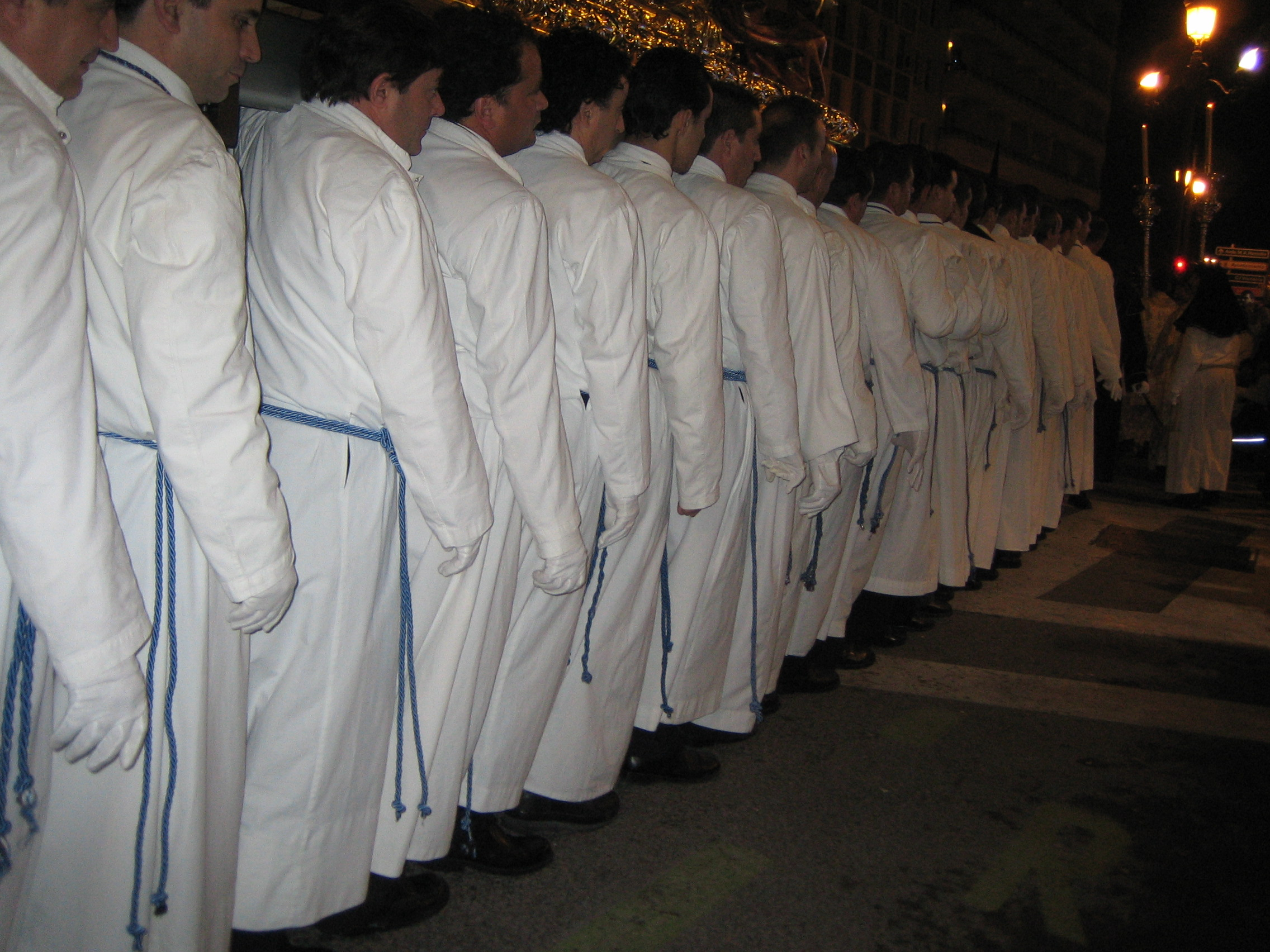 Hombres de trono de Maria Santisima del Amor,Hermandad de Jesús El Rico, Málaga.